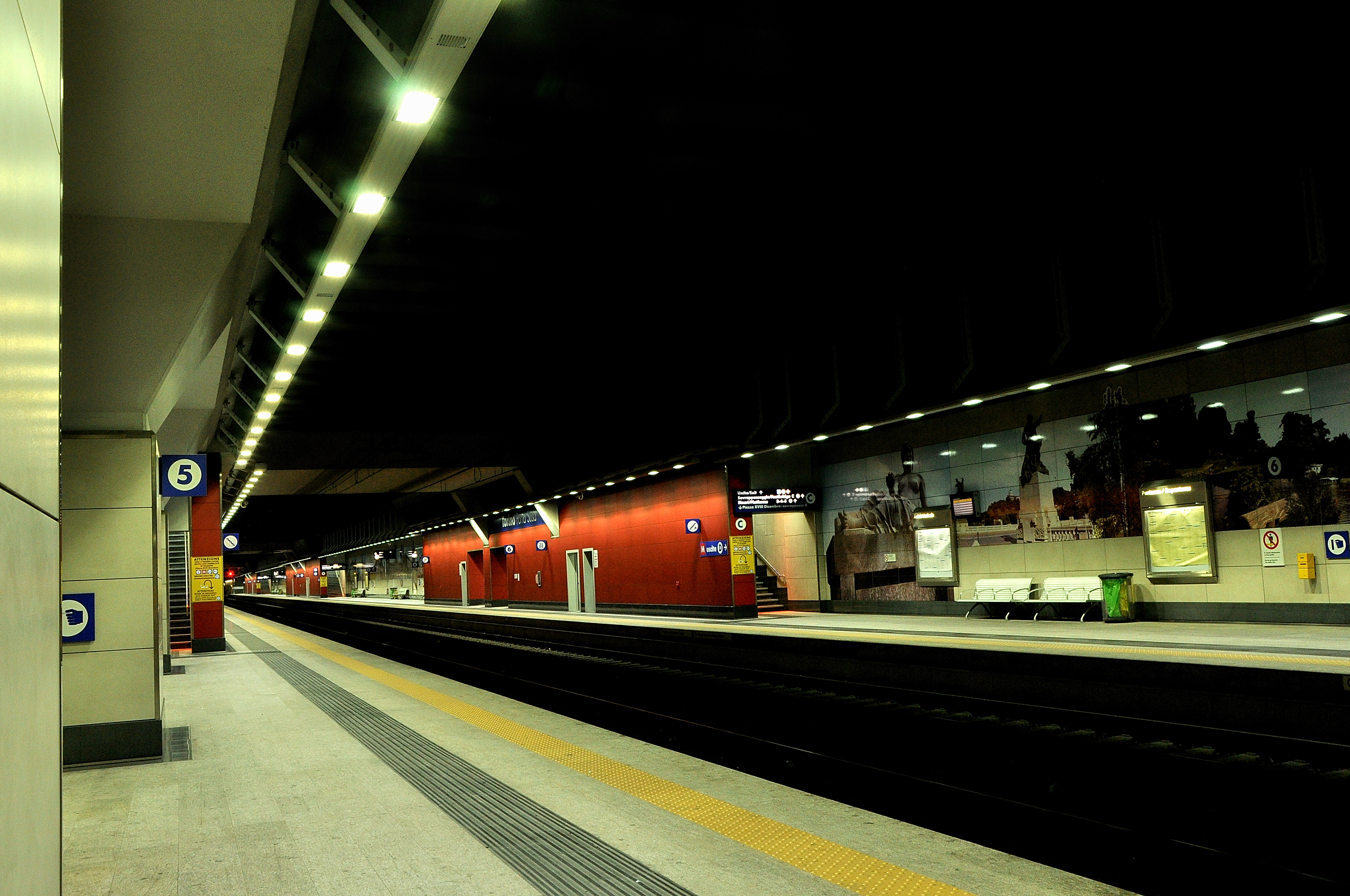 Stazione ferroviaria di Torino Porta Susa